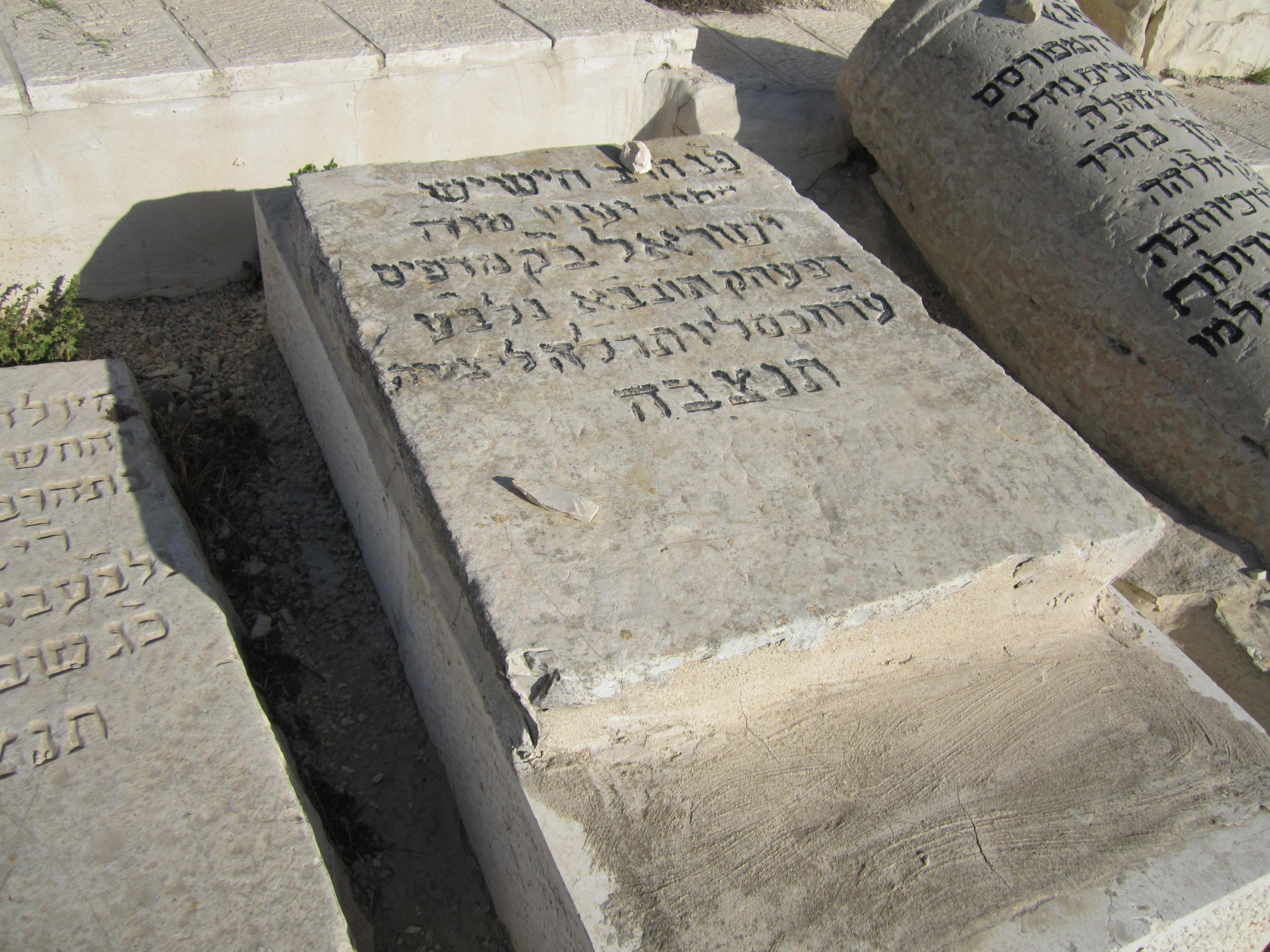 הכיתוב על המצבה: פ"נ הרב הישיש חסיד ועניו מו"ה ישראל ב"ק מדפיס דפעה"ק תובב"א נלב"ע ער"ח כסליו תרל"ה ליצירה תנצבה